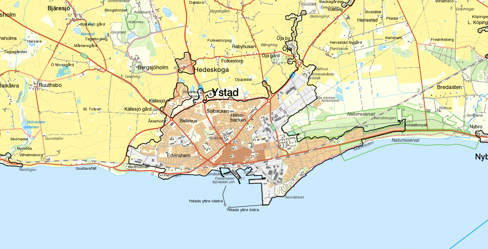 Tätorten Ystad (samt även hela tätorten Hedeskoga) med gränserna från Statistiska centralbyråns tätortsavgränsning 2015 i svart. Bakgrundskarta från Lantmäteriet, skala 1:30 236.